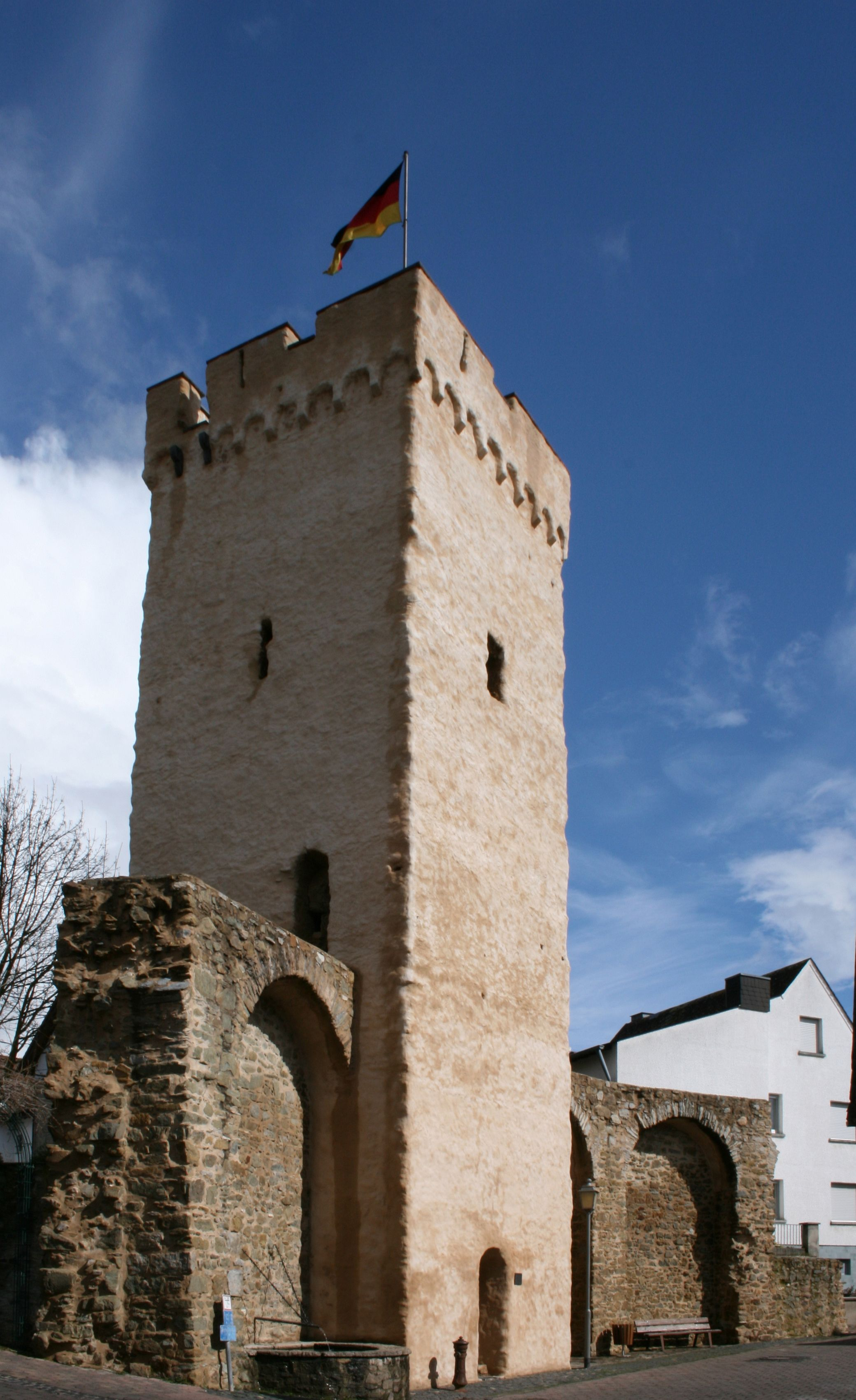 Gefangenenturm, Niederbrechen, Deutschland